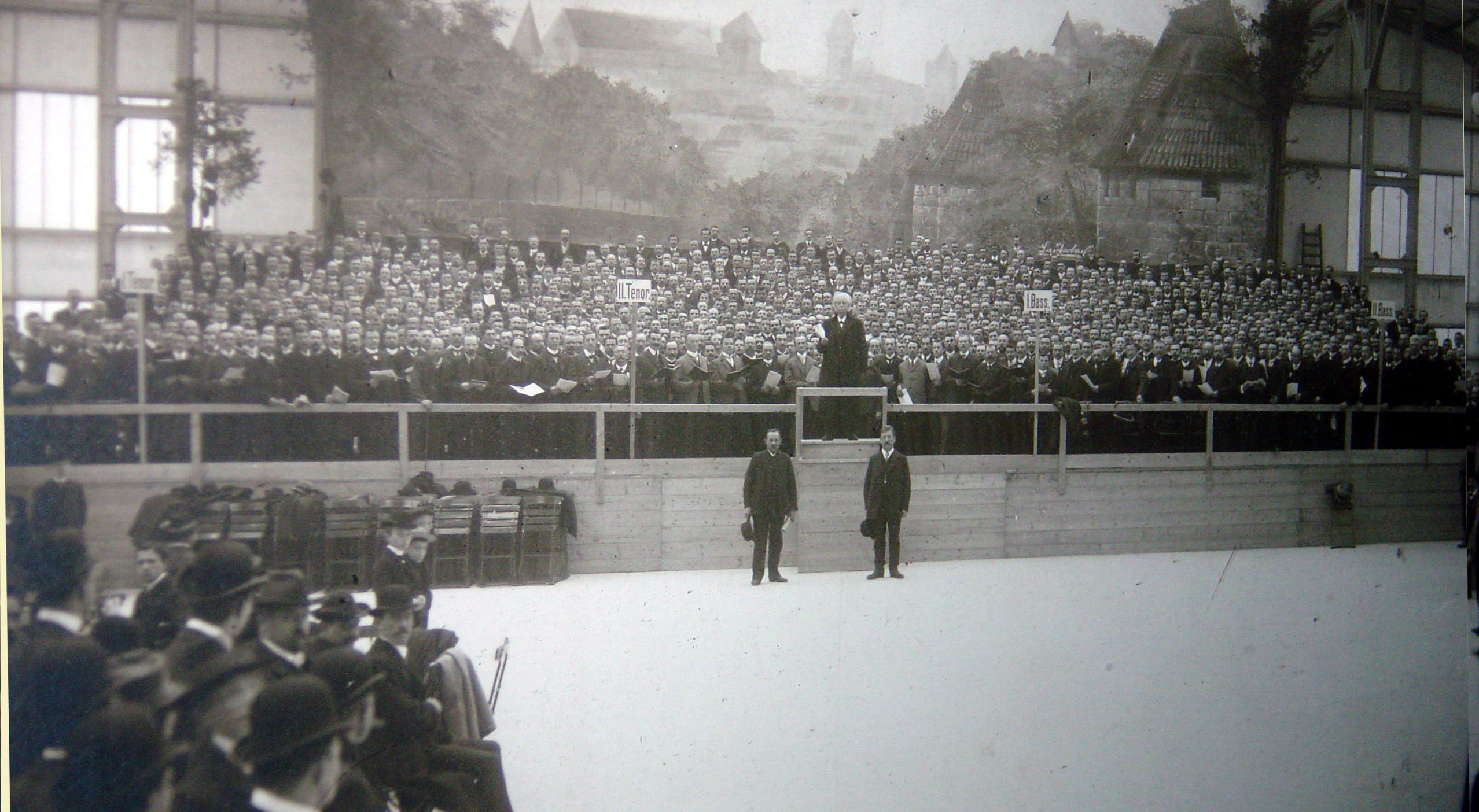 Wendelin Weißheimer mit einem Massenchor